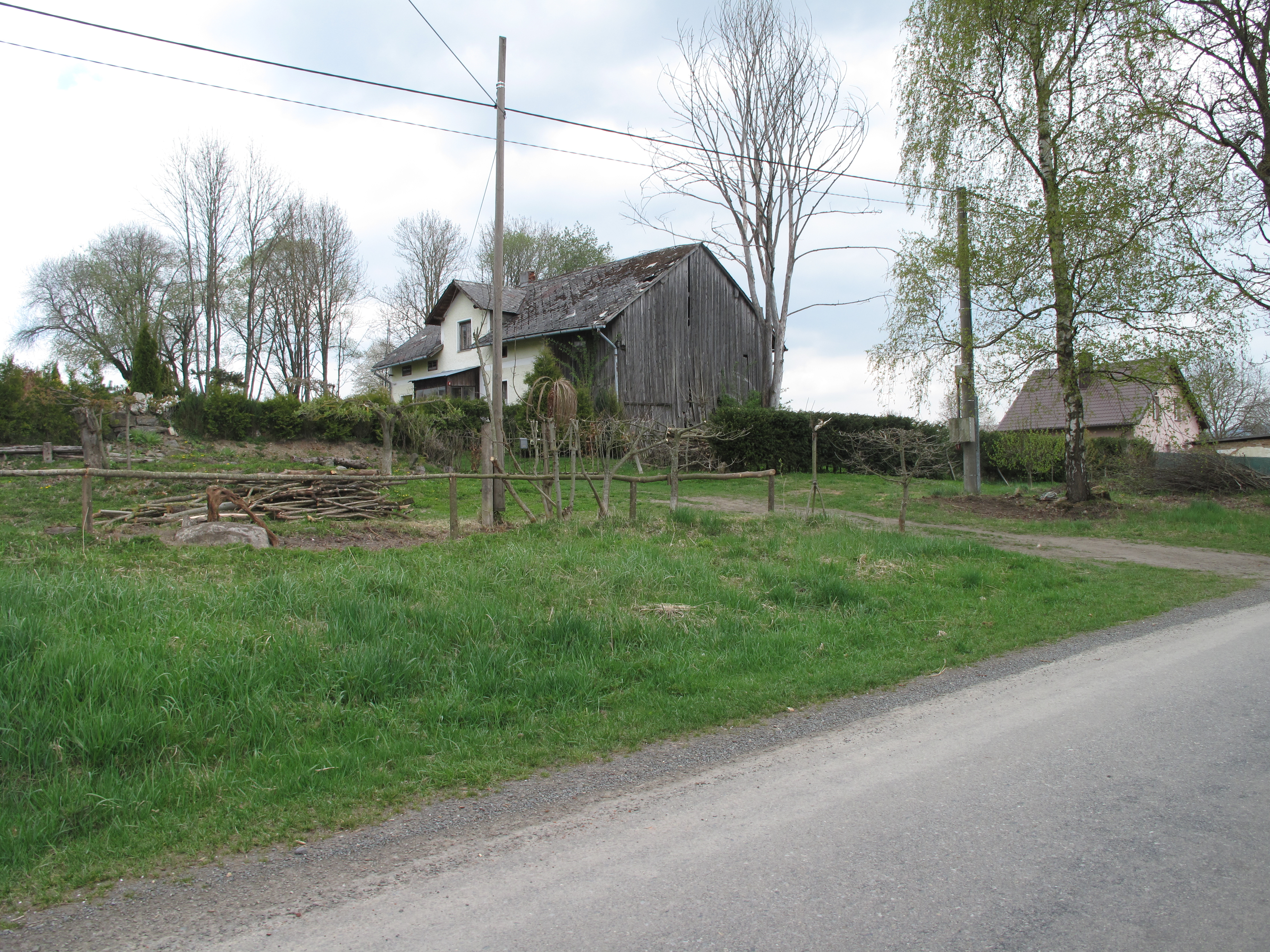 Pomezí (Všeruby). Okres Domažlice, Česká republika.